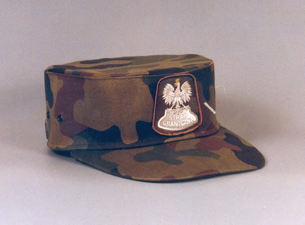 Czapka polowa typu kepi w kamuflażu wz. 93.